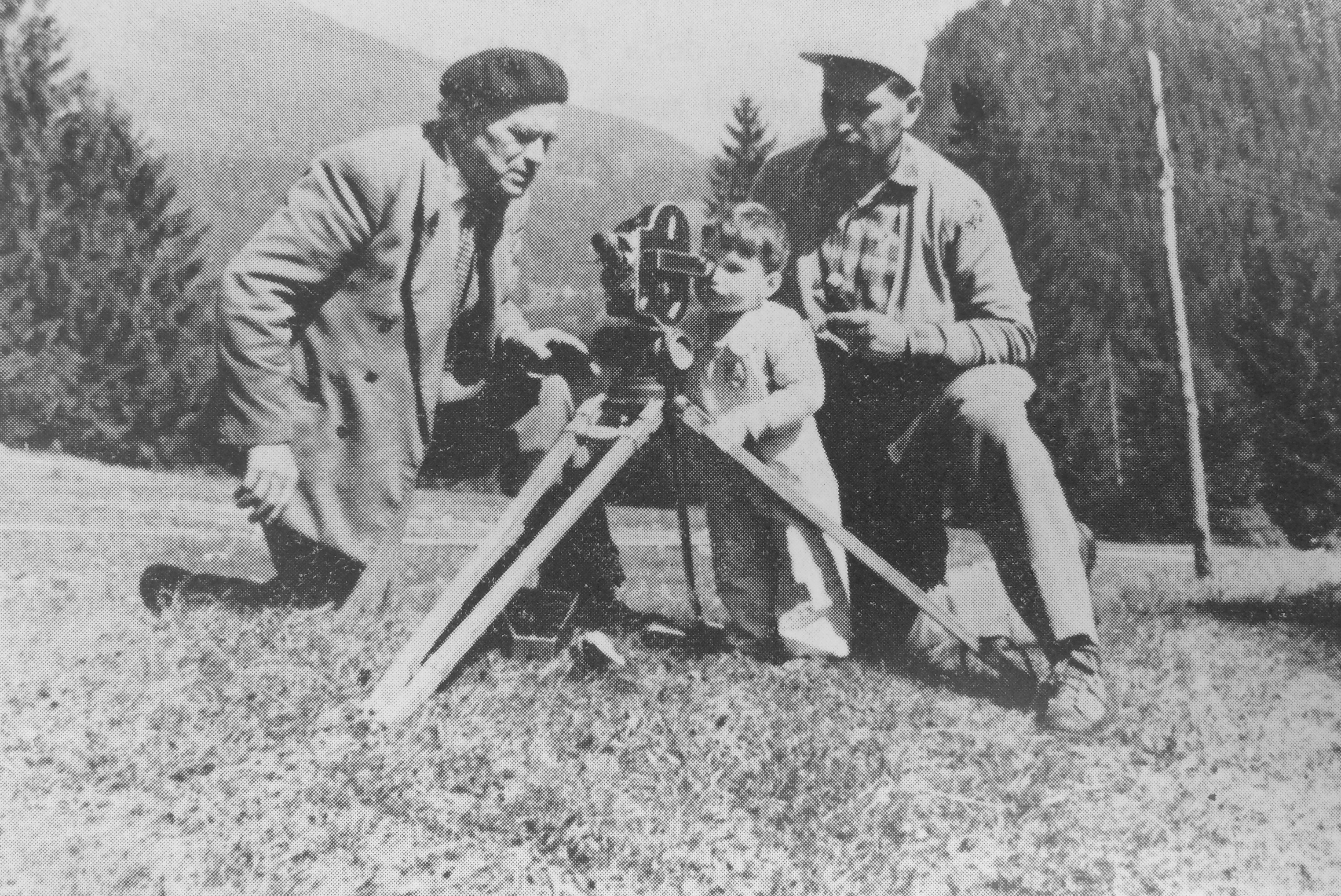 Famiglia Vitrotti